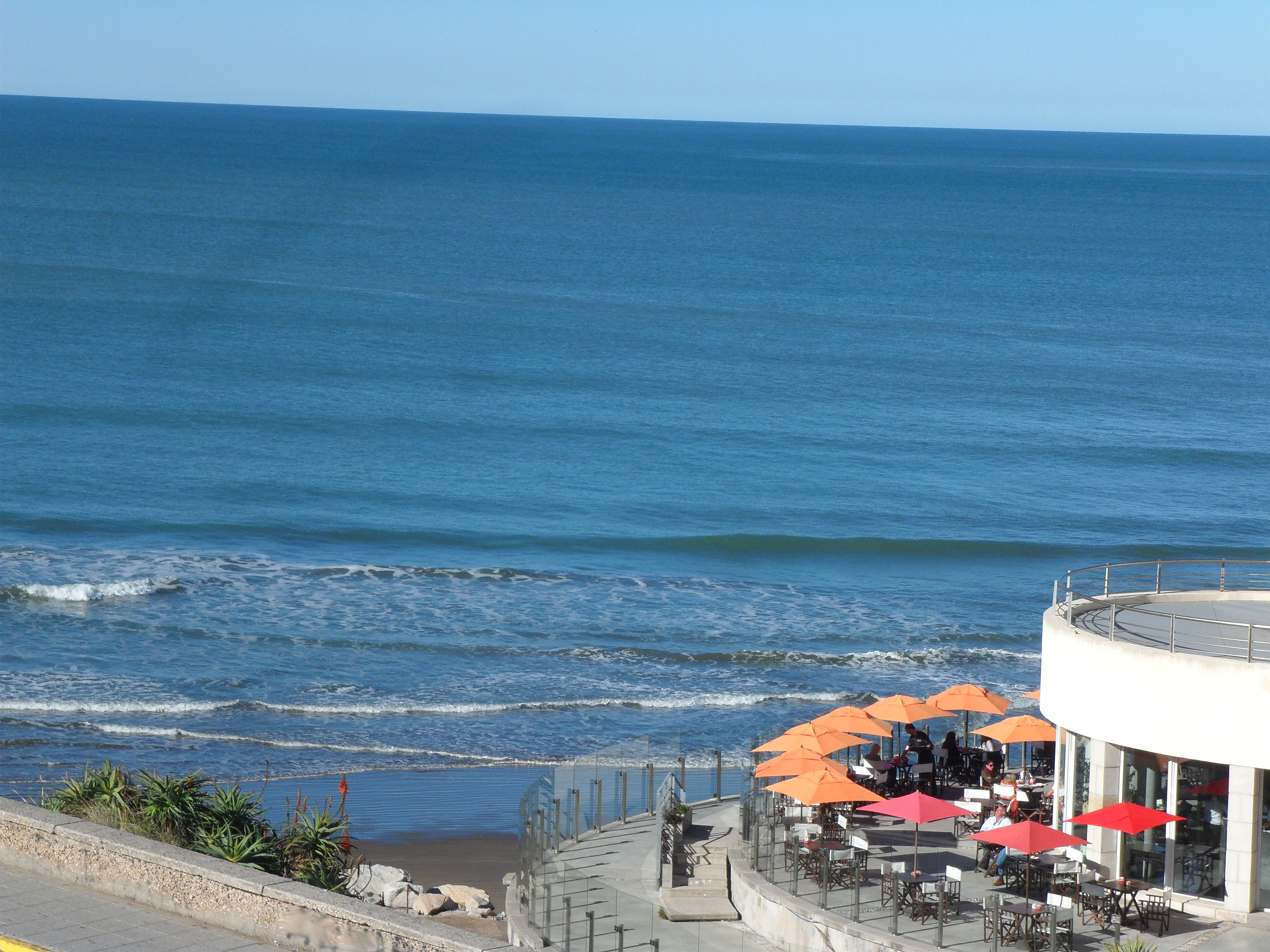 vista general.